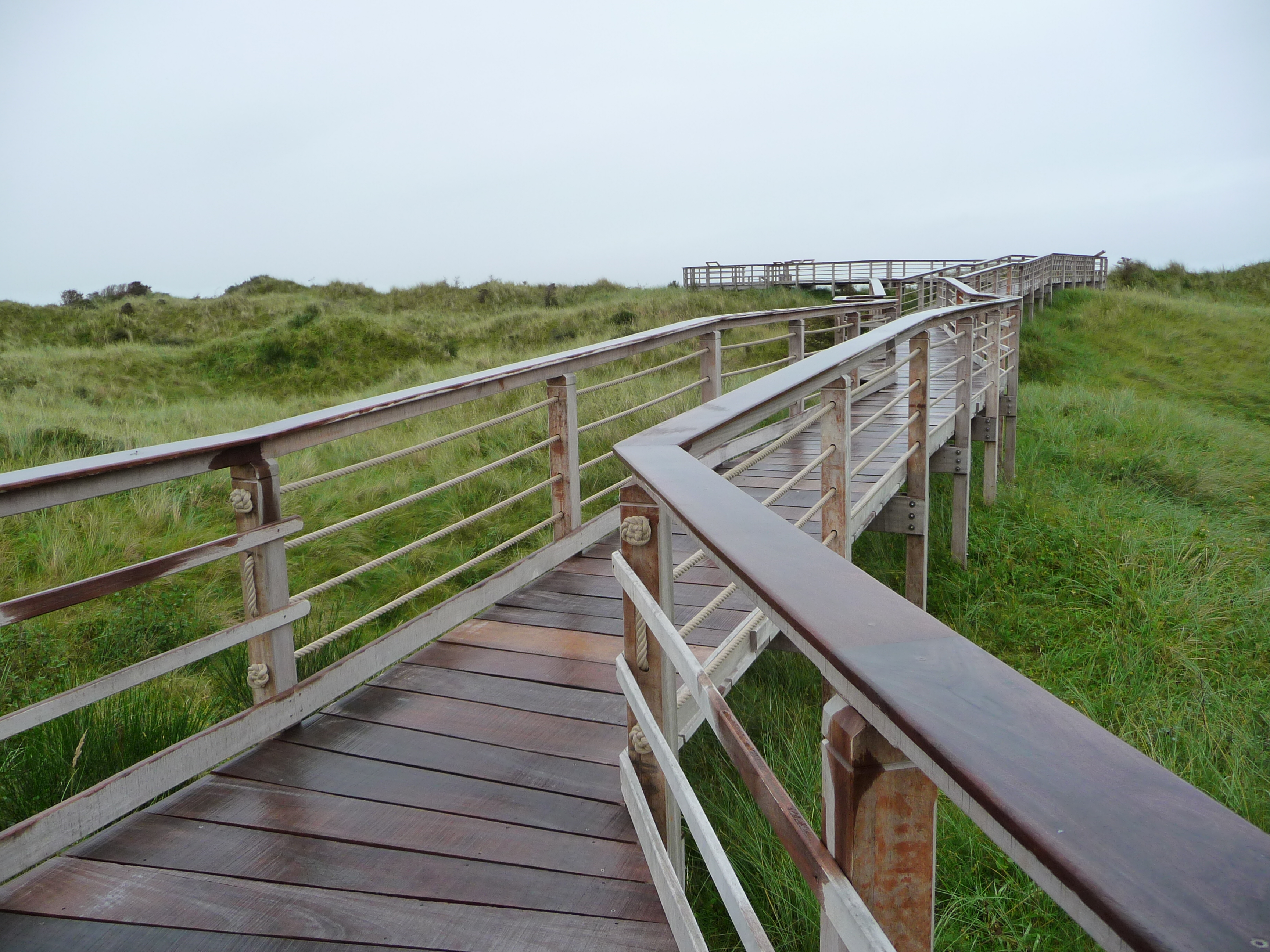 Holzbrücke auf dem Otto-Leege-Pfad auf der ostfriesischen Nordseeinsel Juist (Niedersachsen, Deutschland)